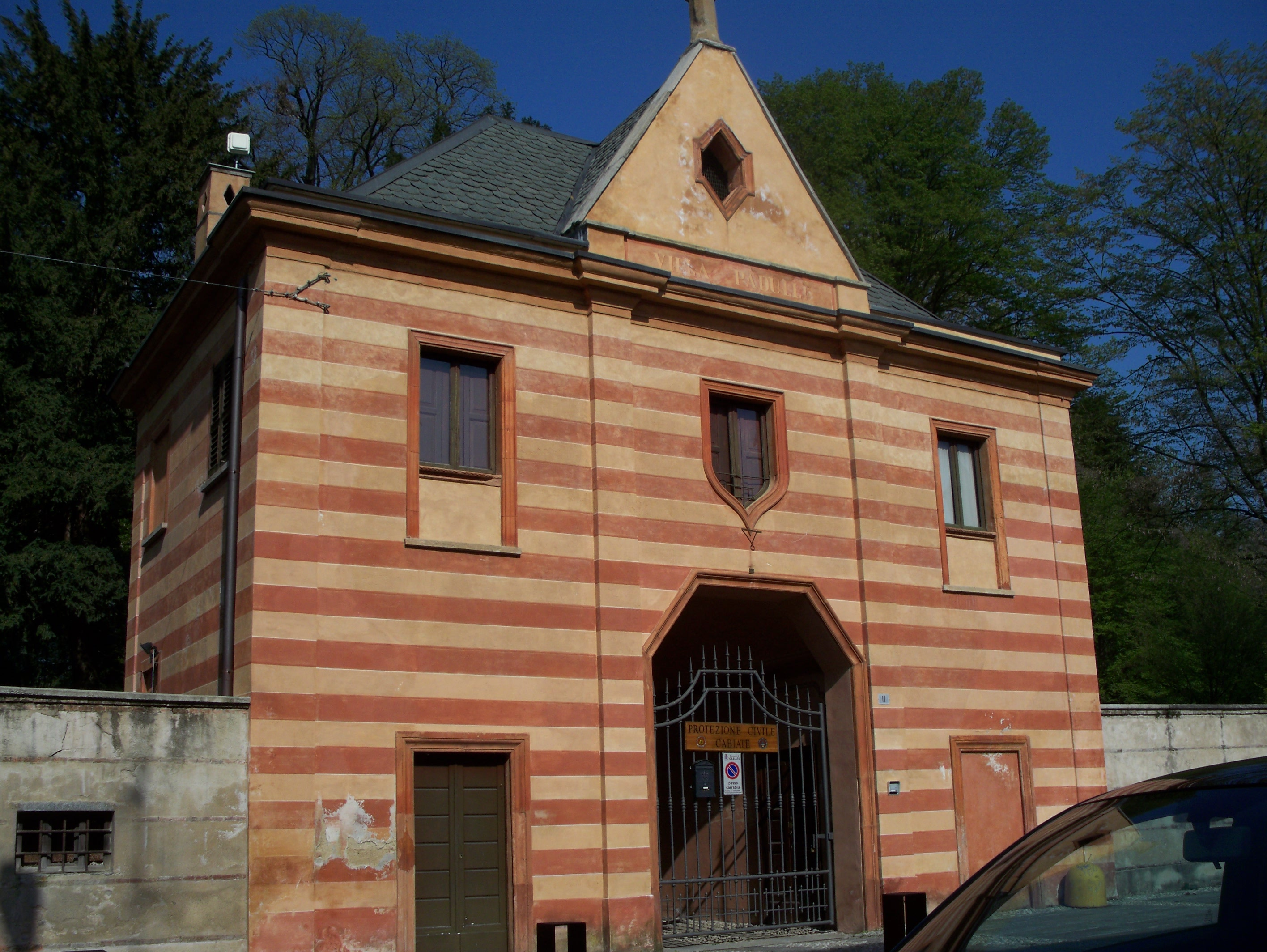 Villa Padulli, Cabiate, CO, Italia (dependace)